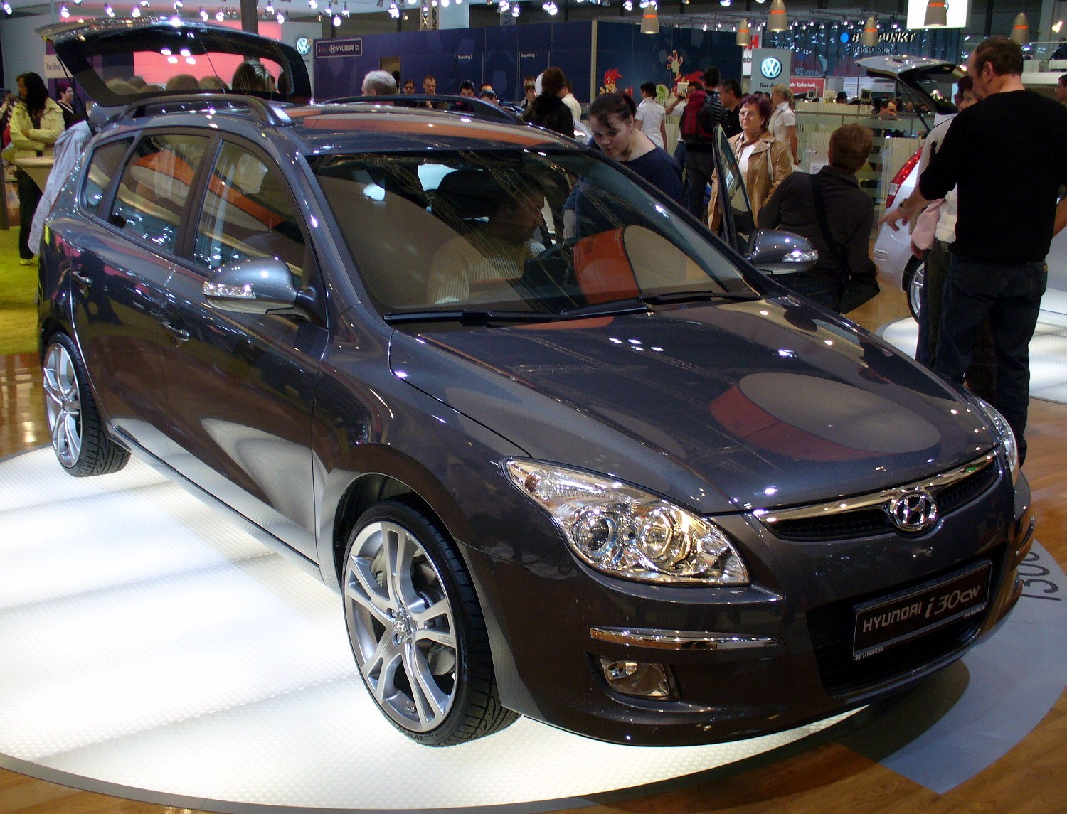 Hyundai i30 CW